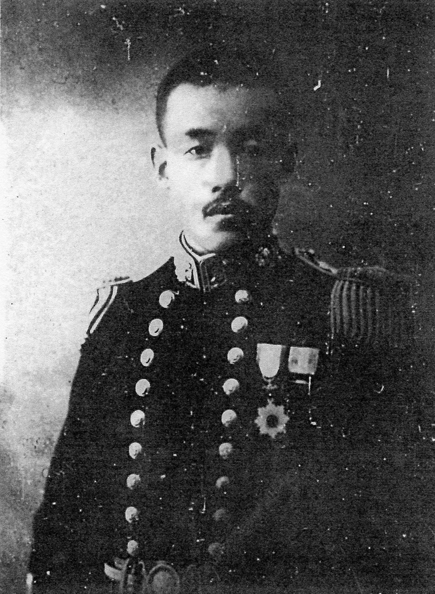 湯浅竹次郎海軍少佐